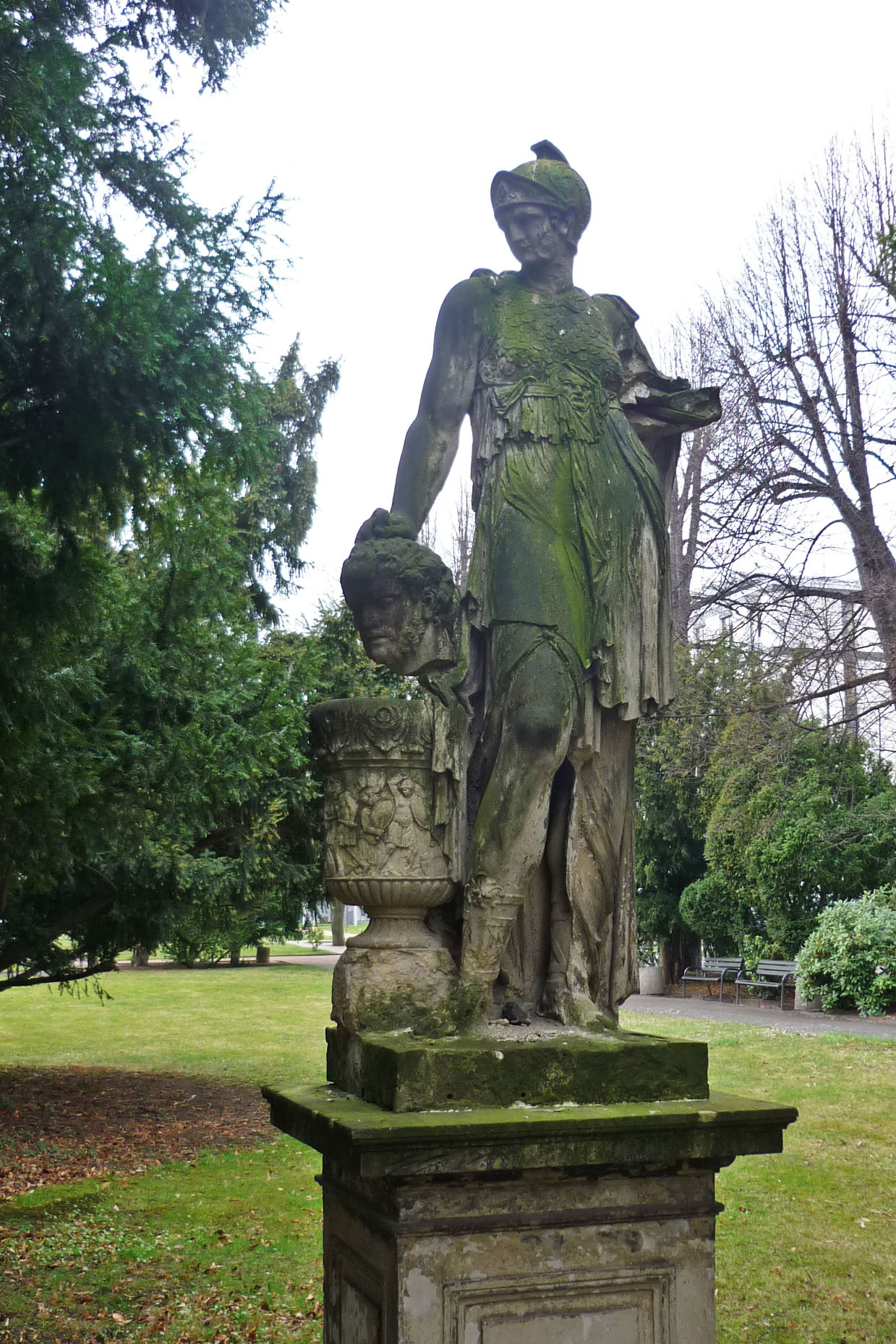 Skulptur Tomyris im Krankenhauspark Friedrichstadt